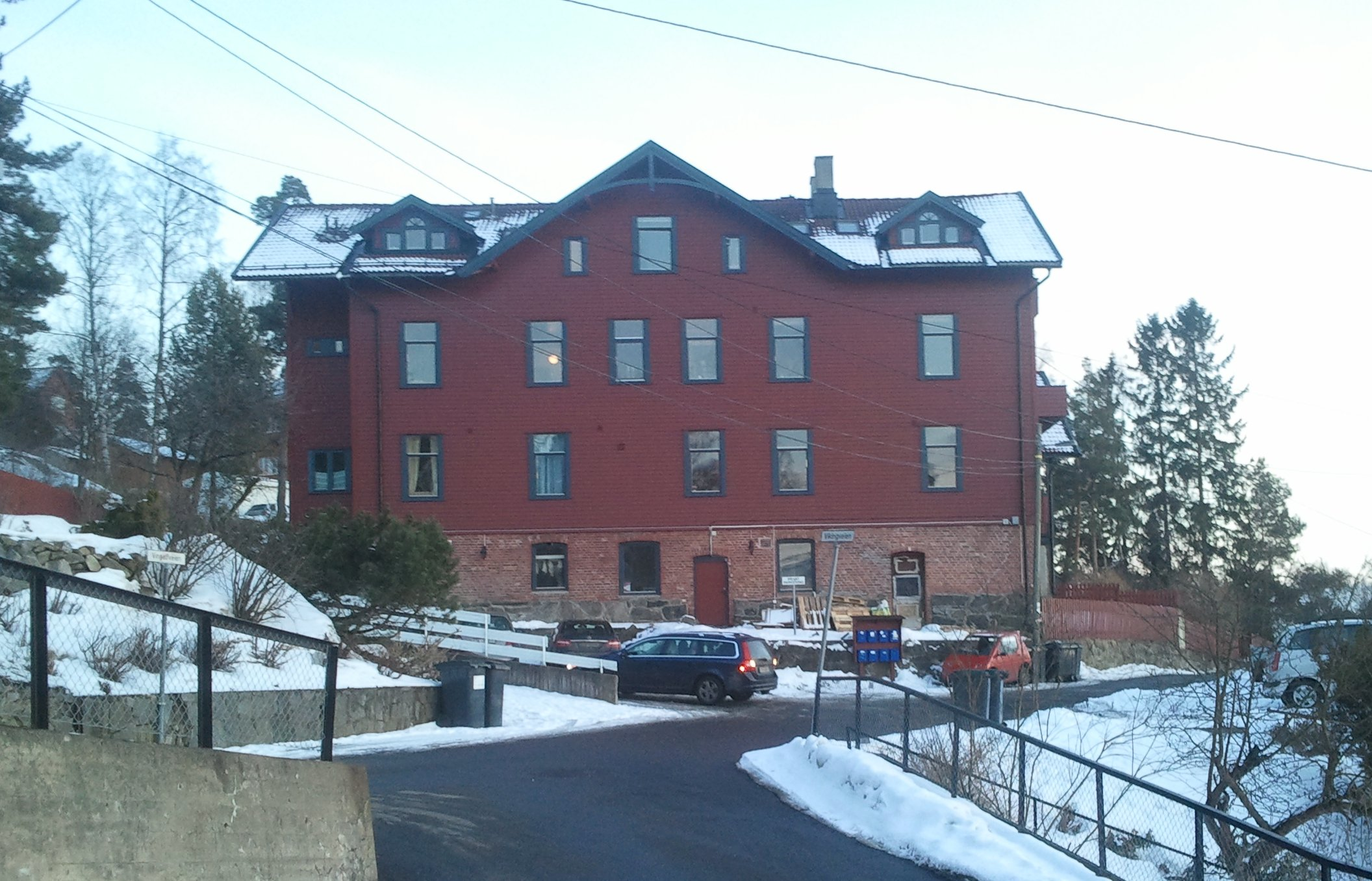 Vingolfveien 12, Oslo, tidligere Byes pensjonat og Nordstrand Husmorskole.